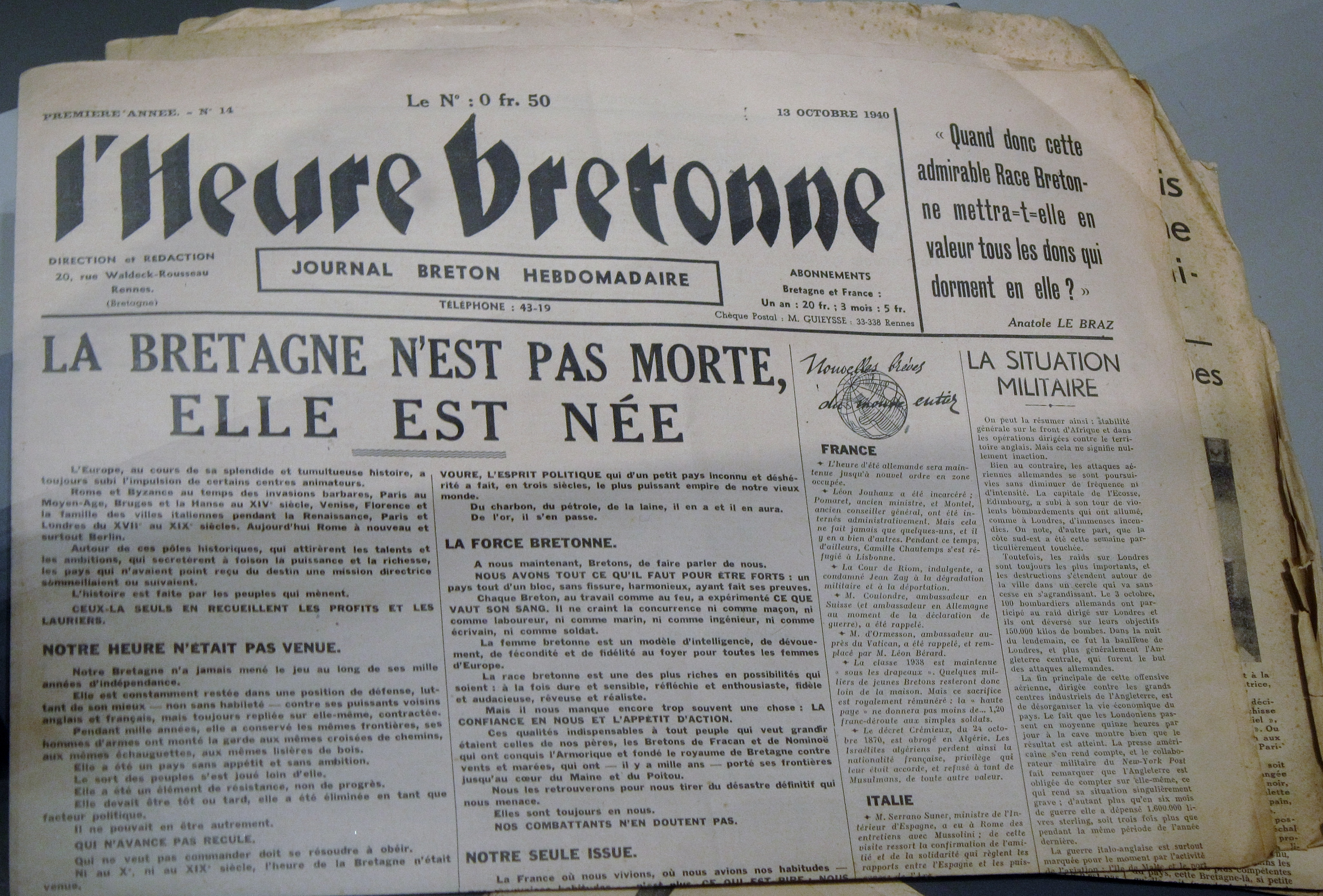 Premiière page du journal "L'Heure bretonne" du 13 octobre 1940 (Musée Mémoires 39-45 à Plougonvelin)